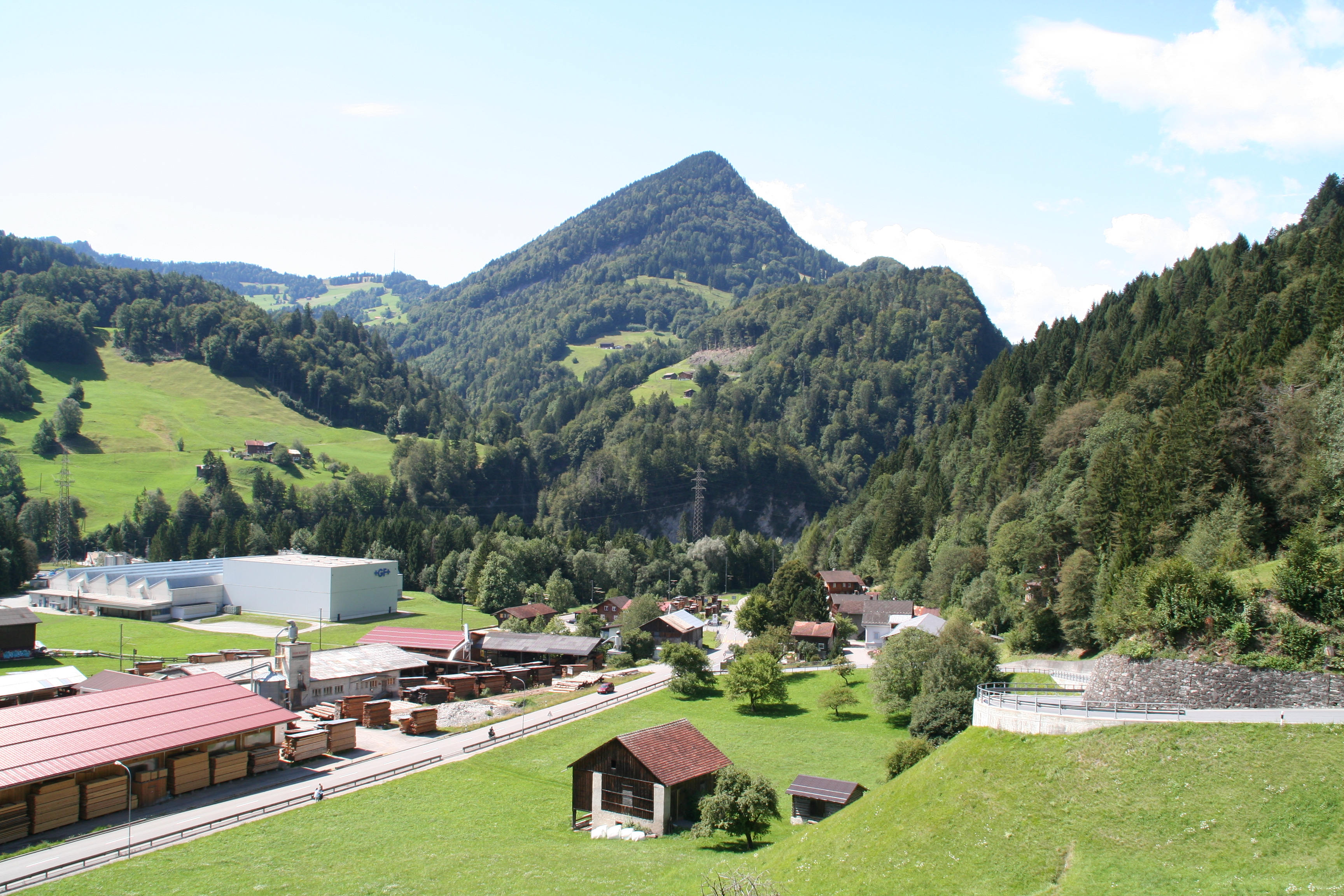 Seewies Pardisla